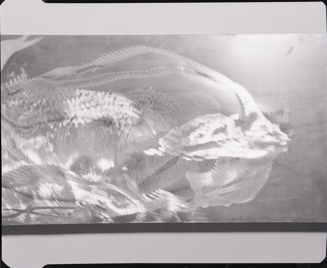 Servizio fotografico : Italia, 1958 / Paolo Monti. - Buste: 38, Fototipi: 41 : Negativo b/n, gelatina bromuro d'argento/ pellicola ; 10x12. - ((Serie costituita da 38 buste sciolte di negativi identificati con i nn.: 4622, 4623, 4624, 4625, 4626, 4627, 4628, 4629, 4630, 4631, 4632, 4633, 4634, 4635, 4636, 4637, 4638, 4639, 4640, 4641, 4642, 4643, 4644, 4645, 4646, 4647, 4648, 4649, 4650, 4651, 4652, 4653, 4654, 4655, 4656, 4657, 4658, 4659, 4660, 4661, 4662, 4663, e tenute insieme da più graffette. - Le buste sono raggruppate con un elastico e con graffette in più blocchi con estremi 4622-4626, 4627-4629, 4630-4637, 4638-4646, 4647-4652, 4653-4663. - Sulla busta identificata con il n. 4622 iscrizione didascalica manoscritta a pennarello. - Sul coperchio della scatola iscrizione documentaria manoscritta a penna: "Pittori/ Cardazzo". - Fonte: Rubrica di Paolo Monti: Archivio 10x12 (ultimi numerati) - dal G1 al (s.d.), presso Archivio Paolo Monti